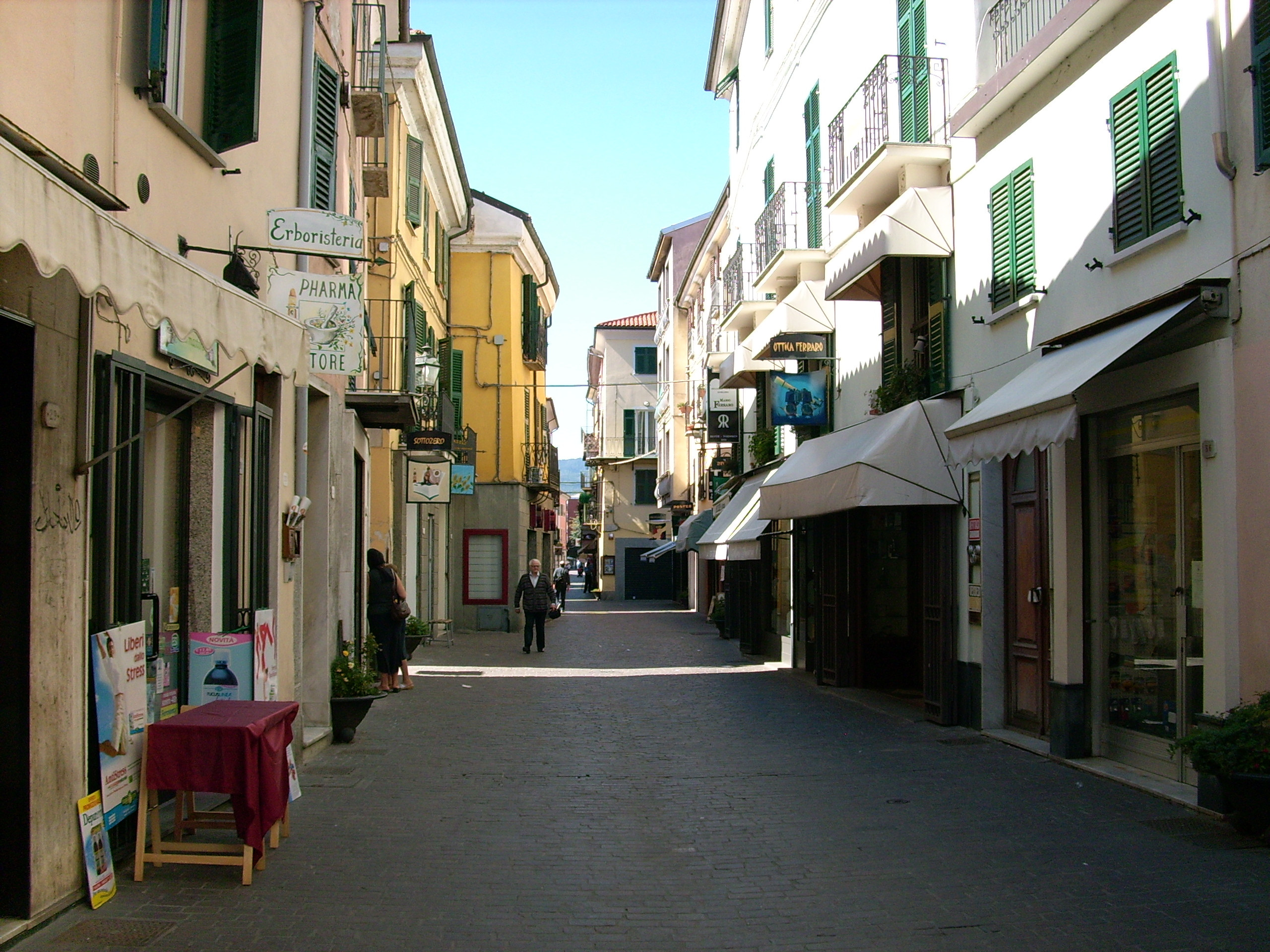 Cairo Montenotte, Liguria, Italia